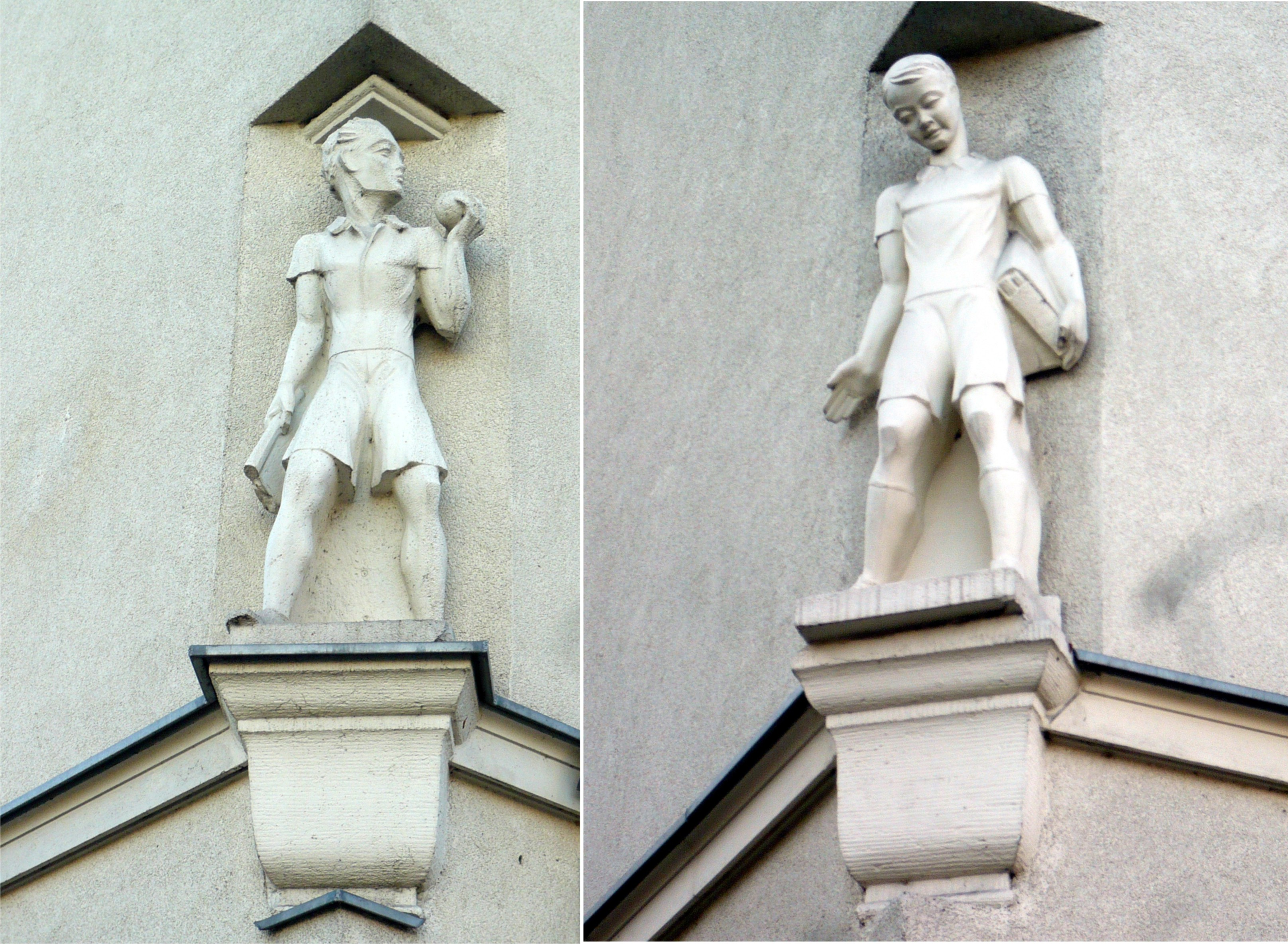 Berlin-Prenzlauer Berg, Ostseestraße /Ostseeplatz: die beiden Fassadenfiguren